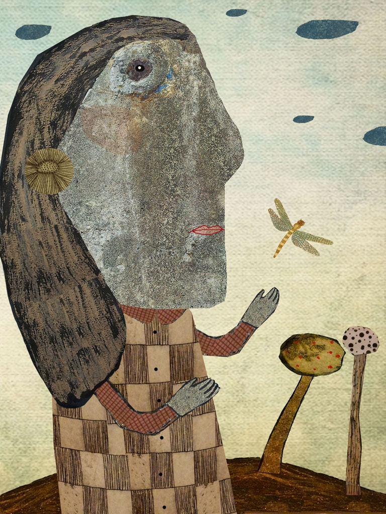 Belen Lucasen ilustrazioa